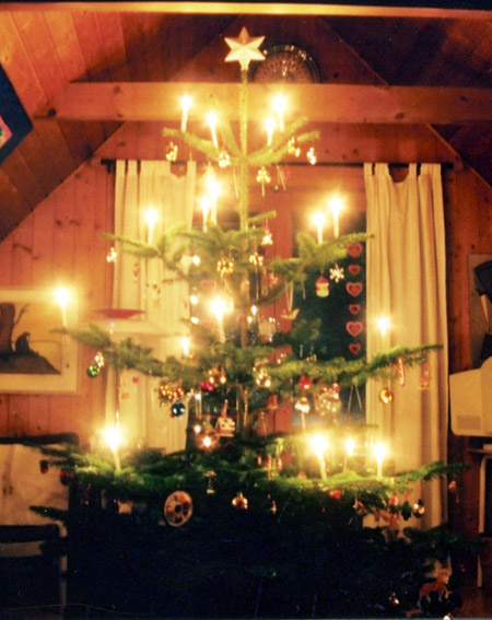 Juletræ